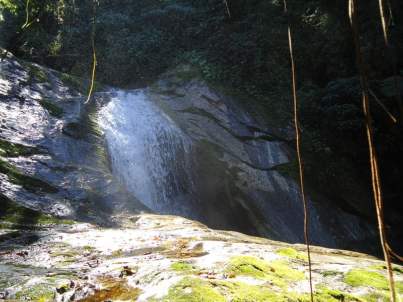 Rio Santo Antônio